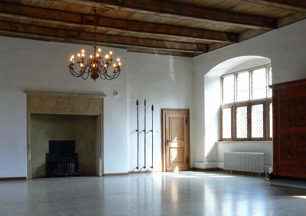 Rittersaal Burg Vischering